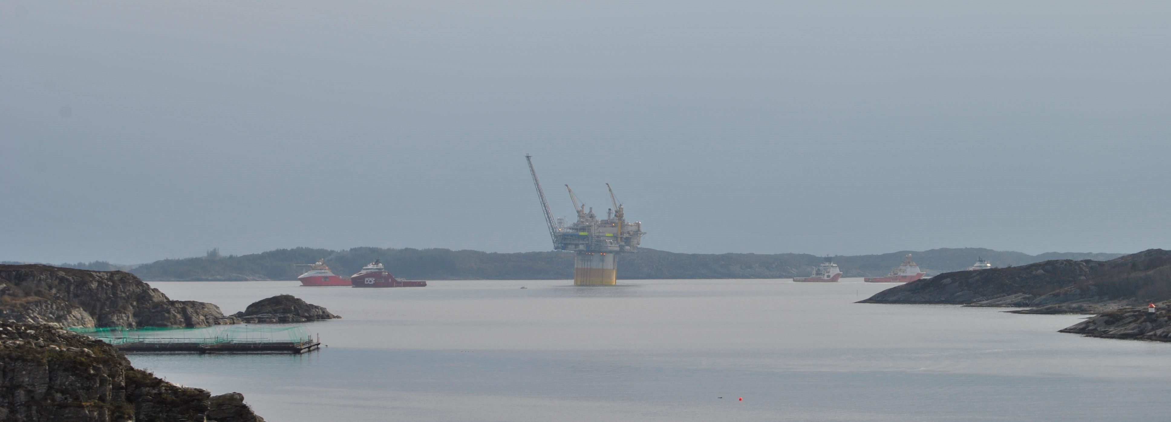 Gassplattformen Aasta Hansteen under slep i Korsfjorden